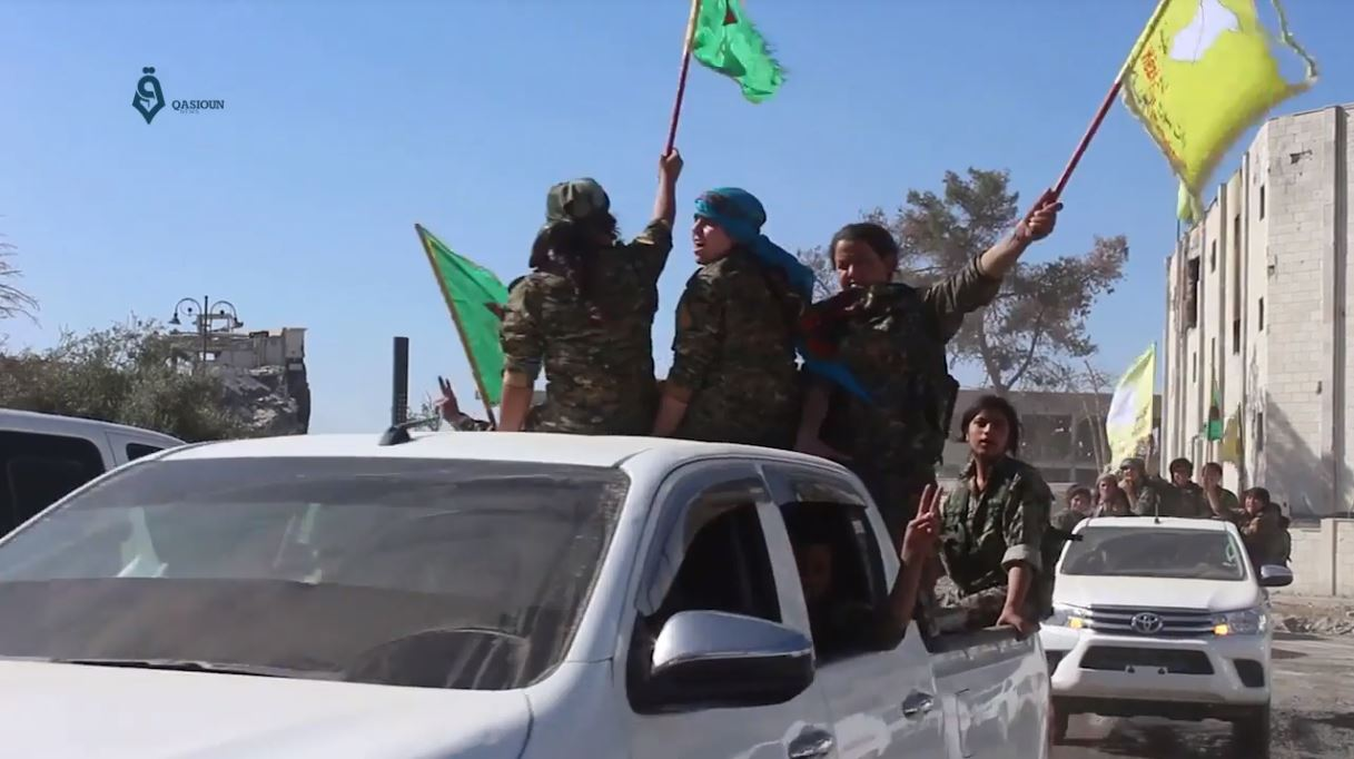 Forces démocratiques syriennes à la fin de la bataille de Raqqa (2017)